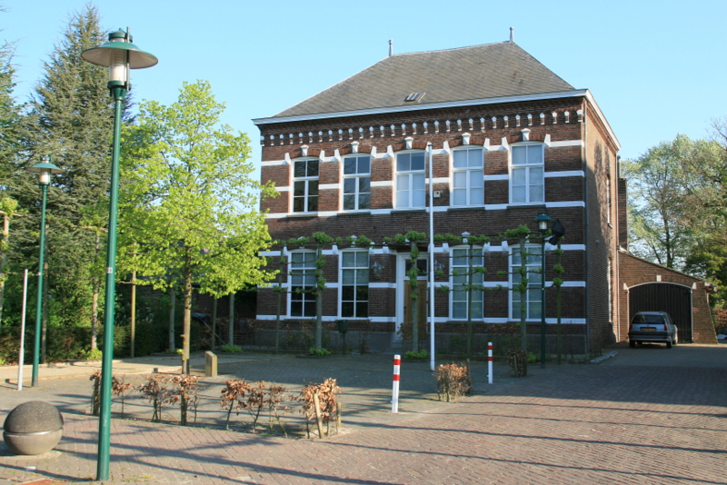 De Moer - Middelstraat 28 - Pastorie